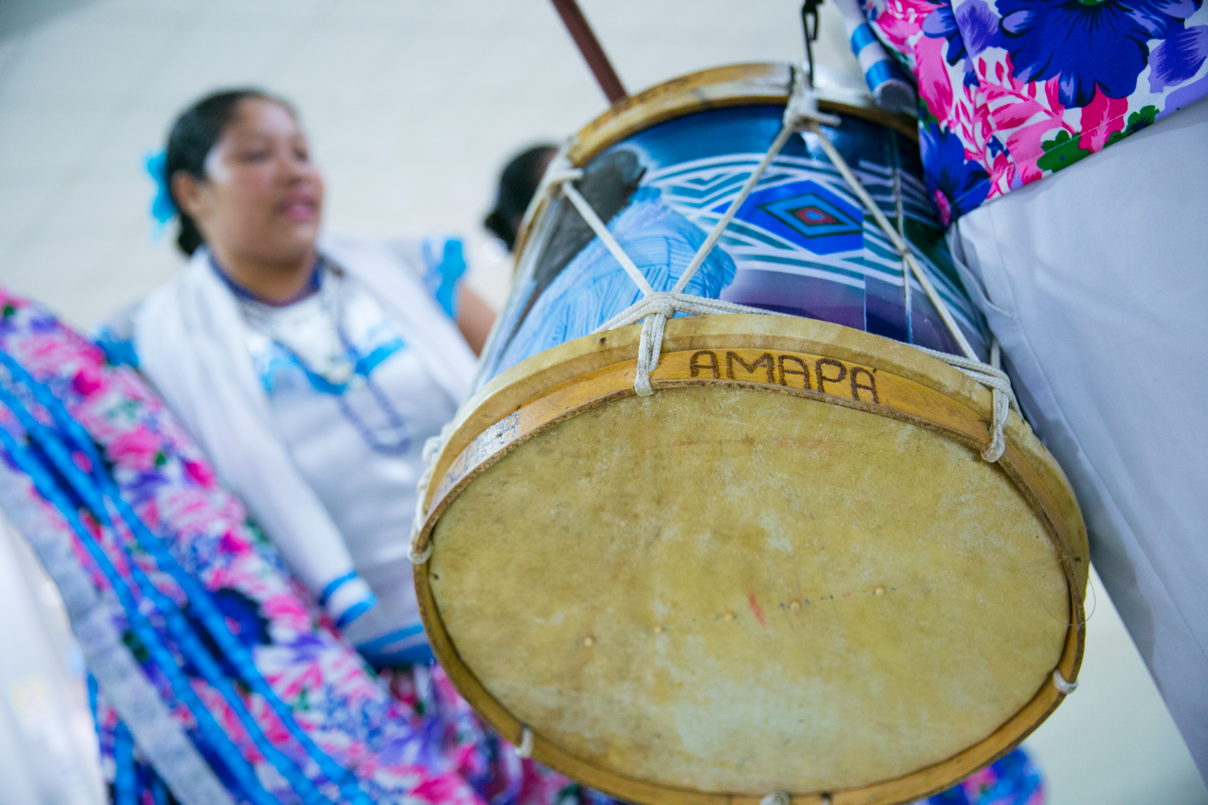 MACAPÁ-AP 26/05/2015 Foto:LiadePaula/MinC